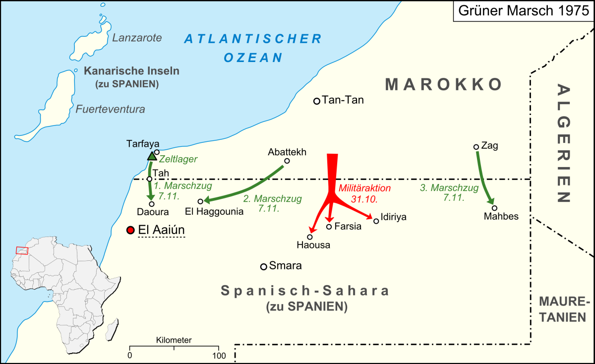 Der Grüne Marsch im November 1975. Marokko kämpft um den Anschluss von Spanisch-Sahara (dem späteren Westsahara).